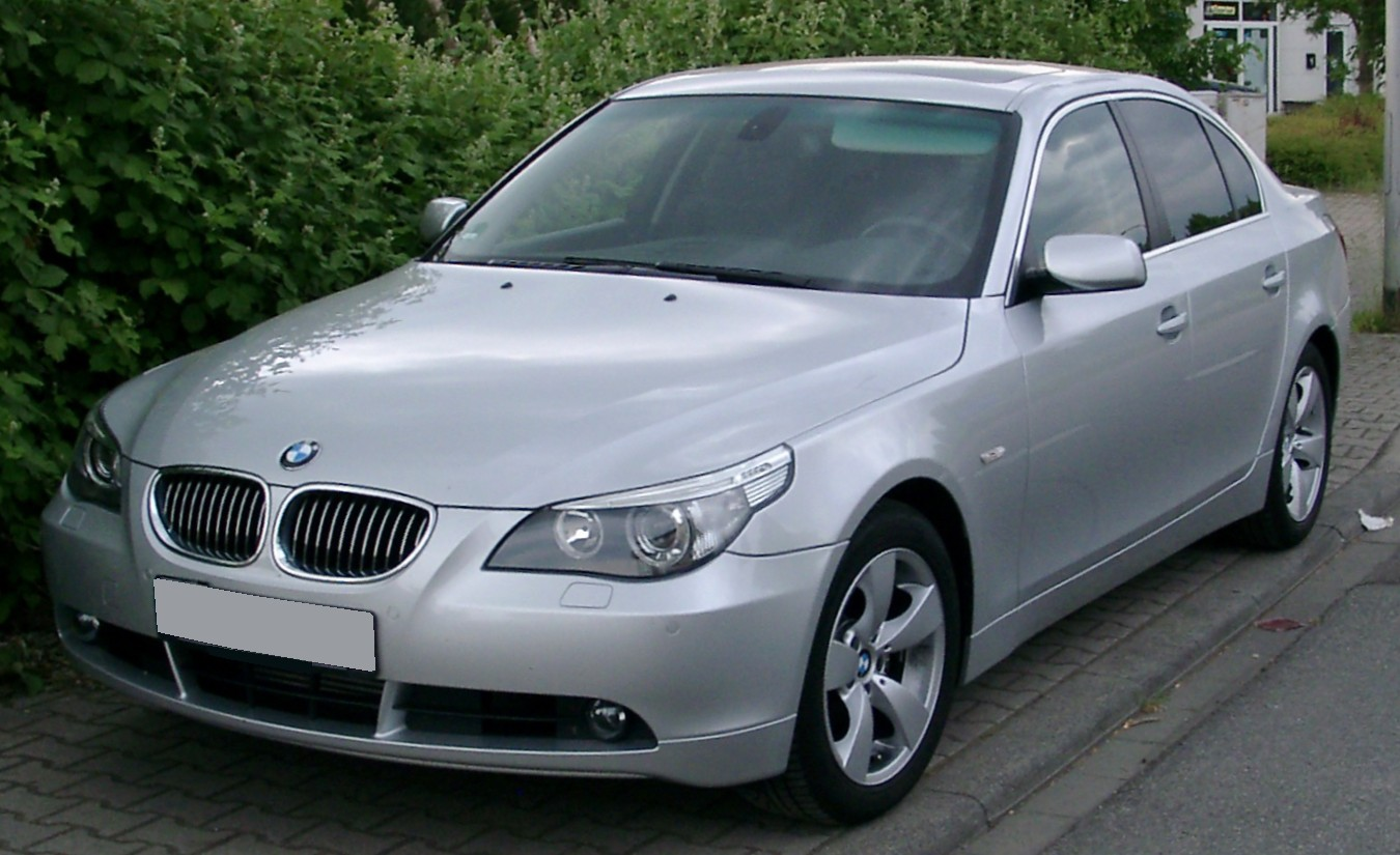 BMW E60